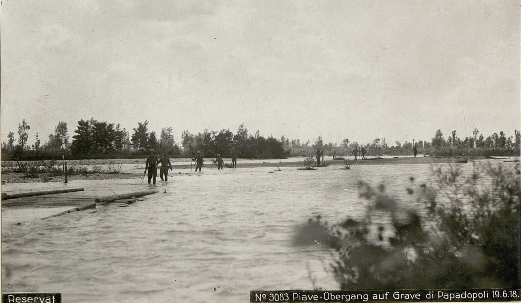 Diese Bilder tragen den Vermerk "Reservat" und waren auf Grund ihres Informationsgehalts nicht für eine Veröffentlichung vorgesehen